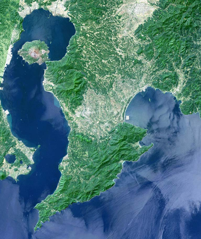 Osumi Peninsula, Kagoshima, Japan.